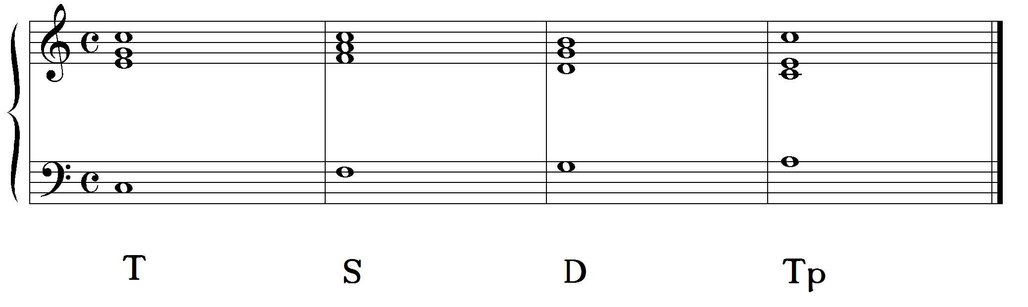 Hier eine Trugschlusskadenz in C: Statt der Dominante erscheint zum Schluss die Tonikaparallele mit Terzverdopplung. Diese Art der Verdopplung gibt es IMMER in der Trugschlusskadenz!